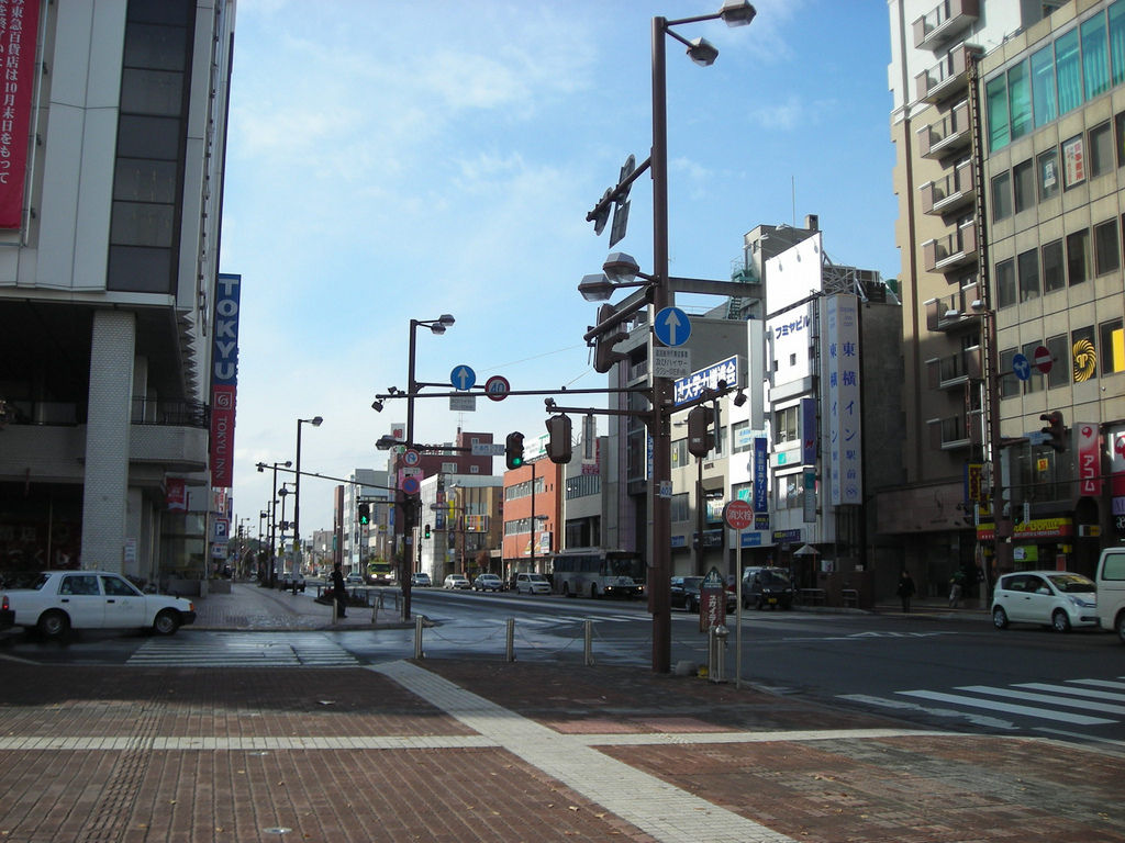 Downtown Kitami, Hokkaido.